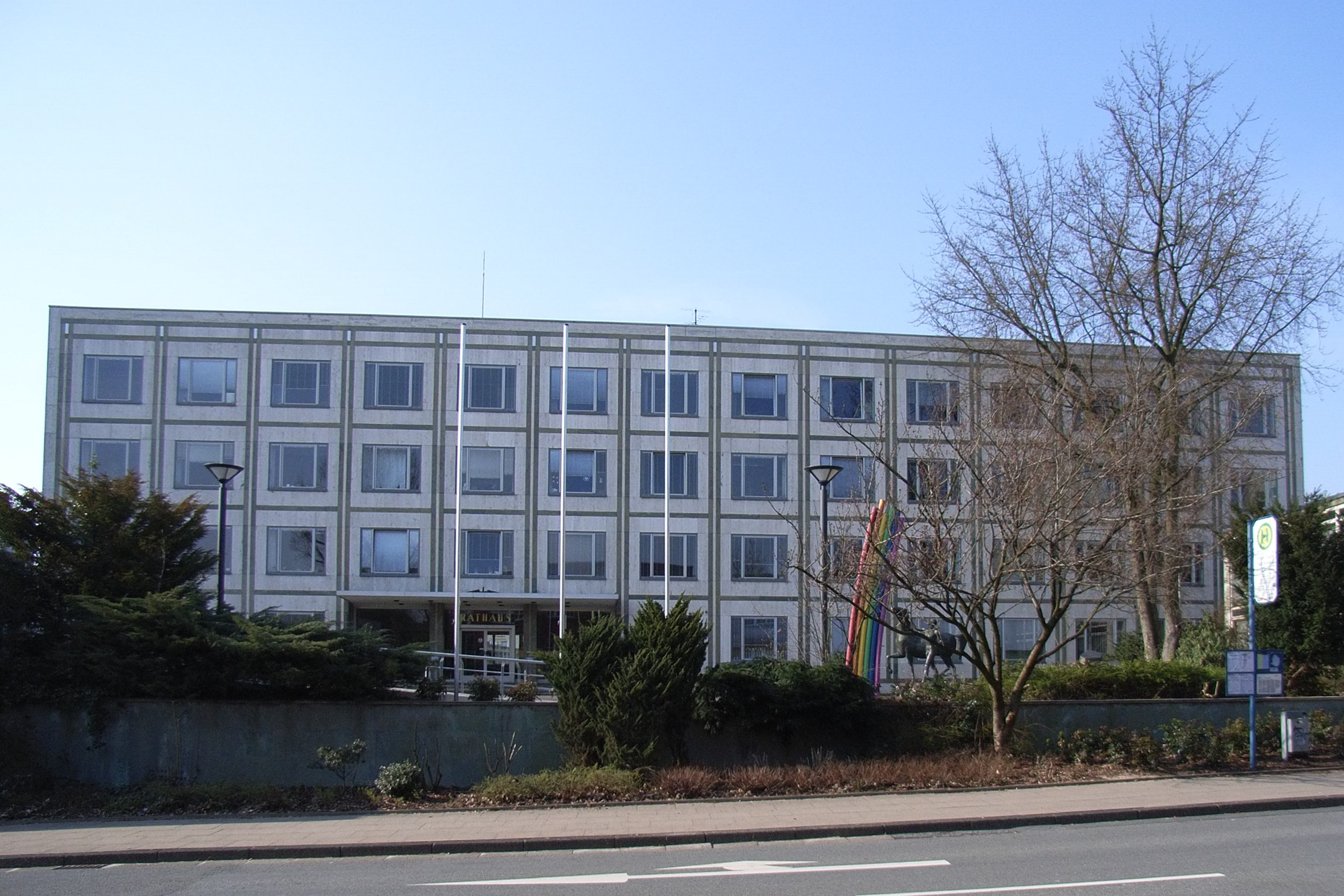 Bielefeld, Deutschland: Bezirksamt Brackwede.